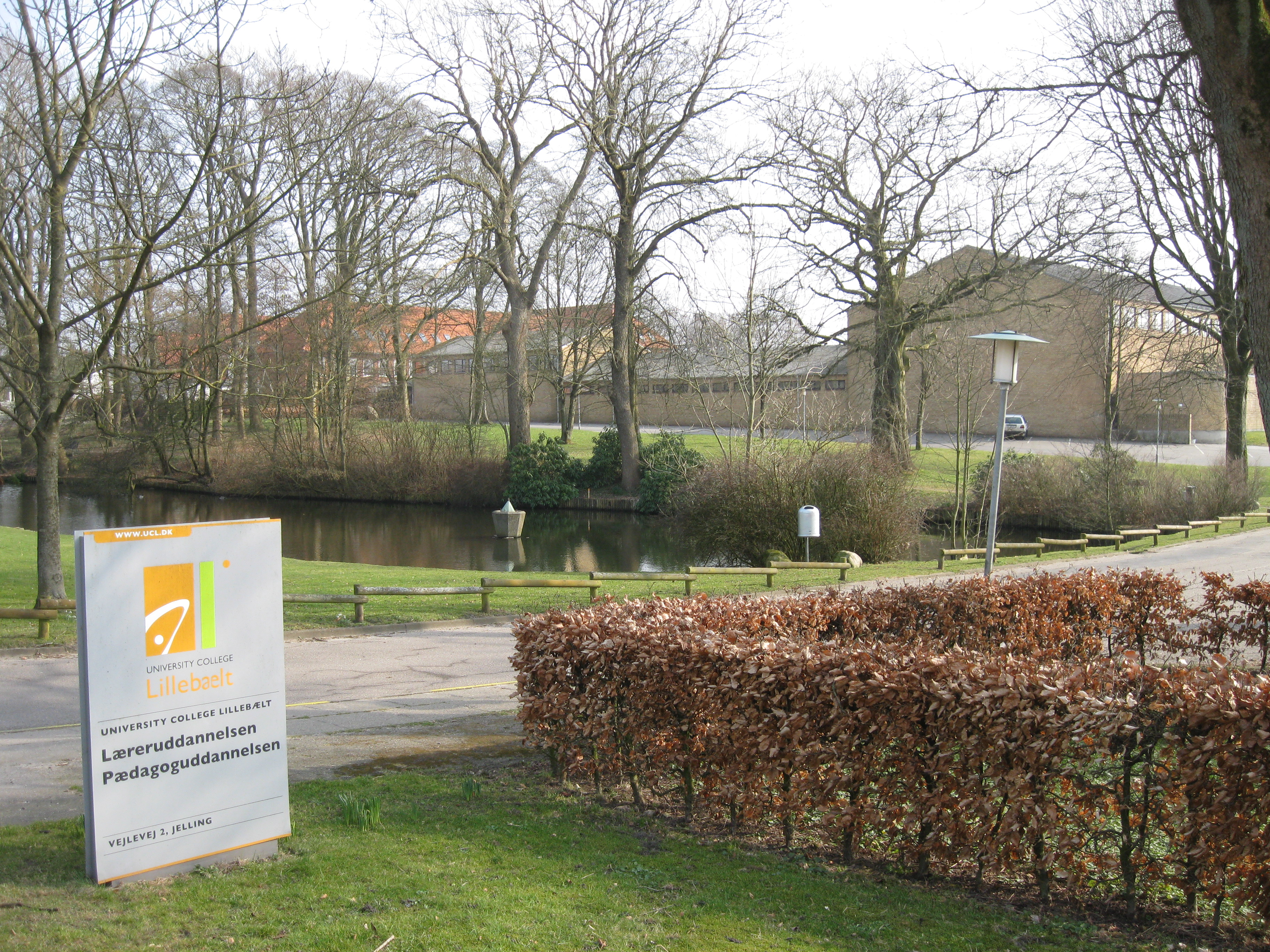 Jelling Statsseminarium